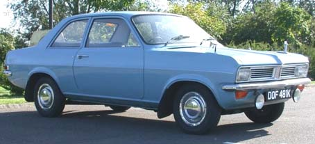 1970-1979 Vauxhall Viva (HC)